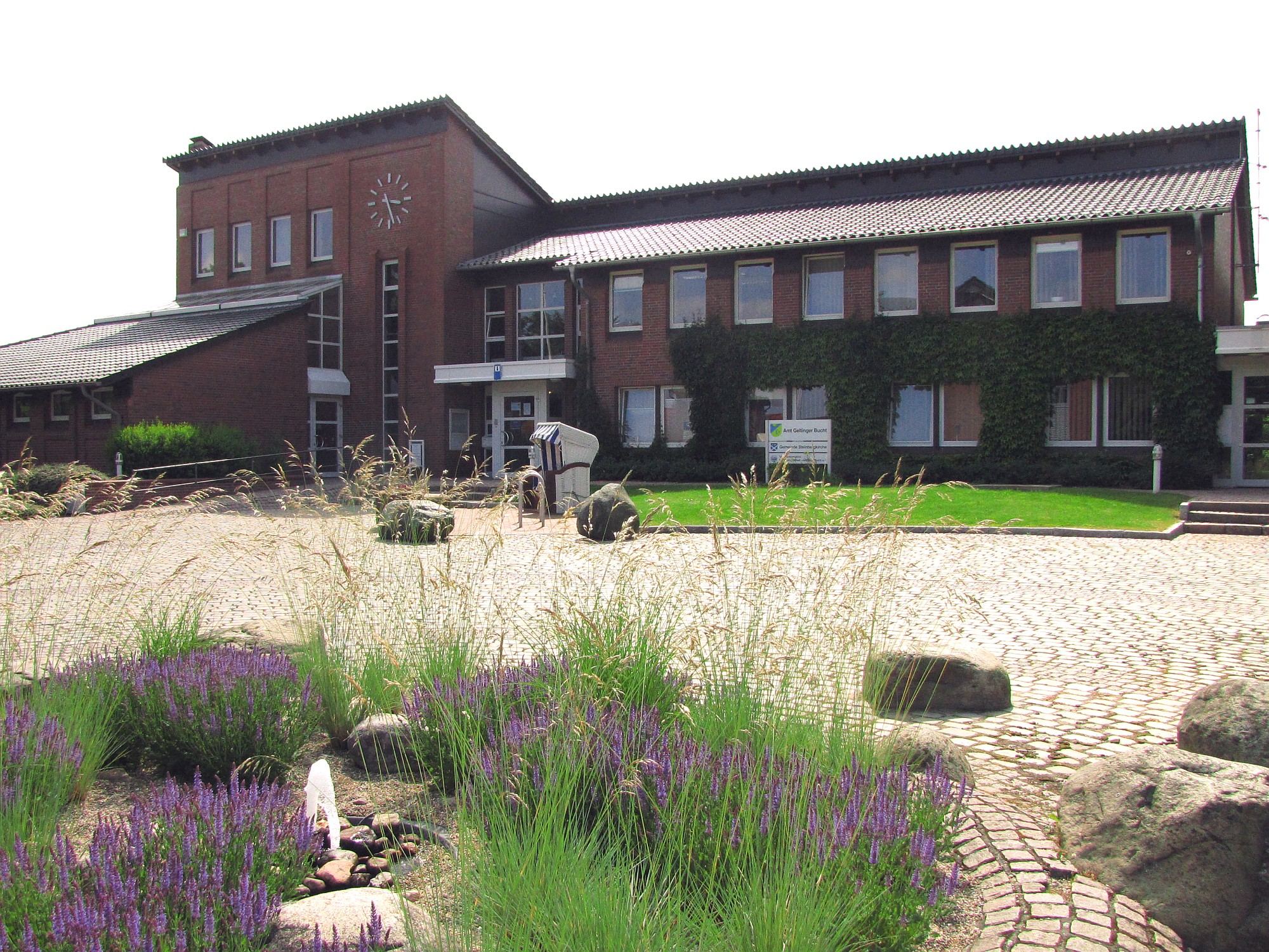 Verwaltungsgebäude vom Amt Geltinger Bucht und von der Gemeindeverwaltung Steinbergkirche in Angeln im Kreis Schleswig-Flensburg Foto Wolfgang Pehlemann Steinberg IMG_7118